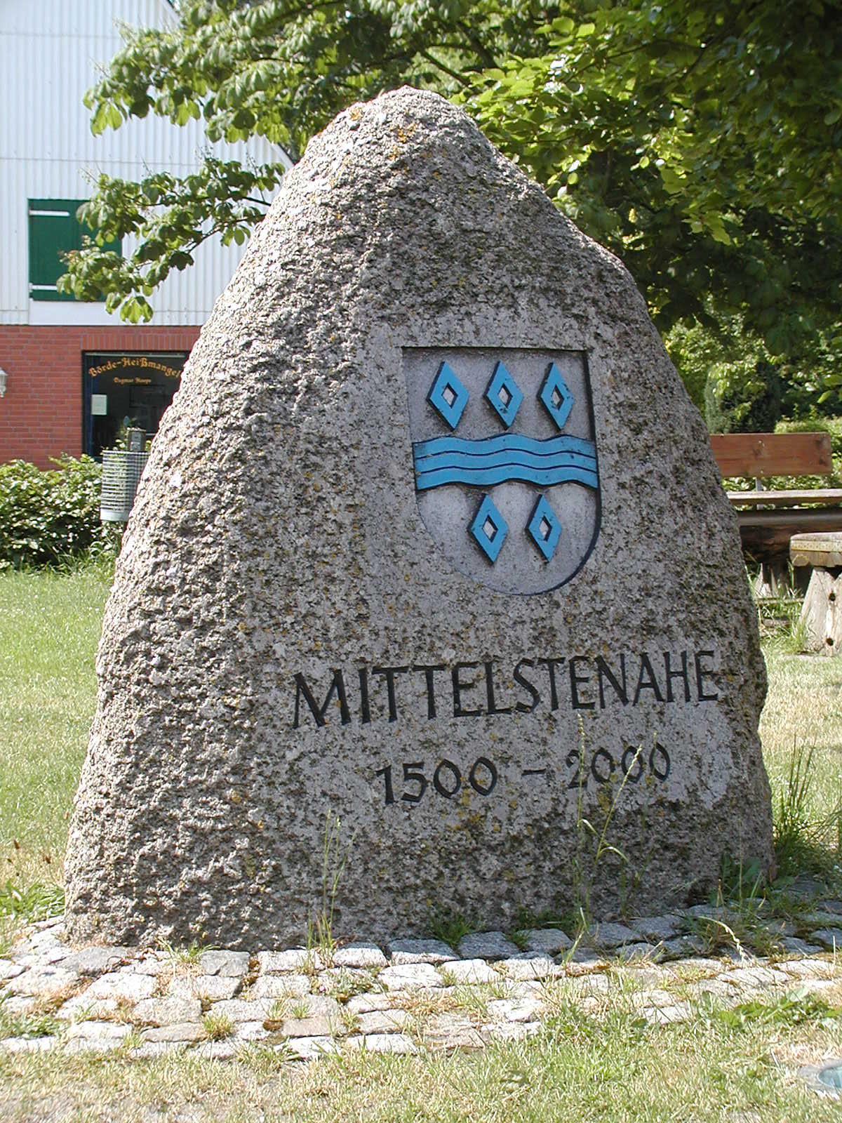 Ein Stein mit Wappen des Dorfes